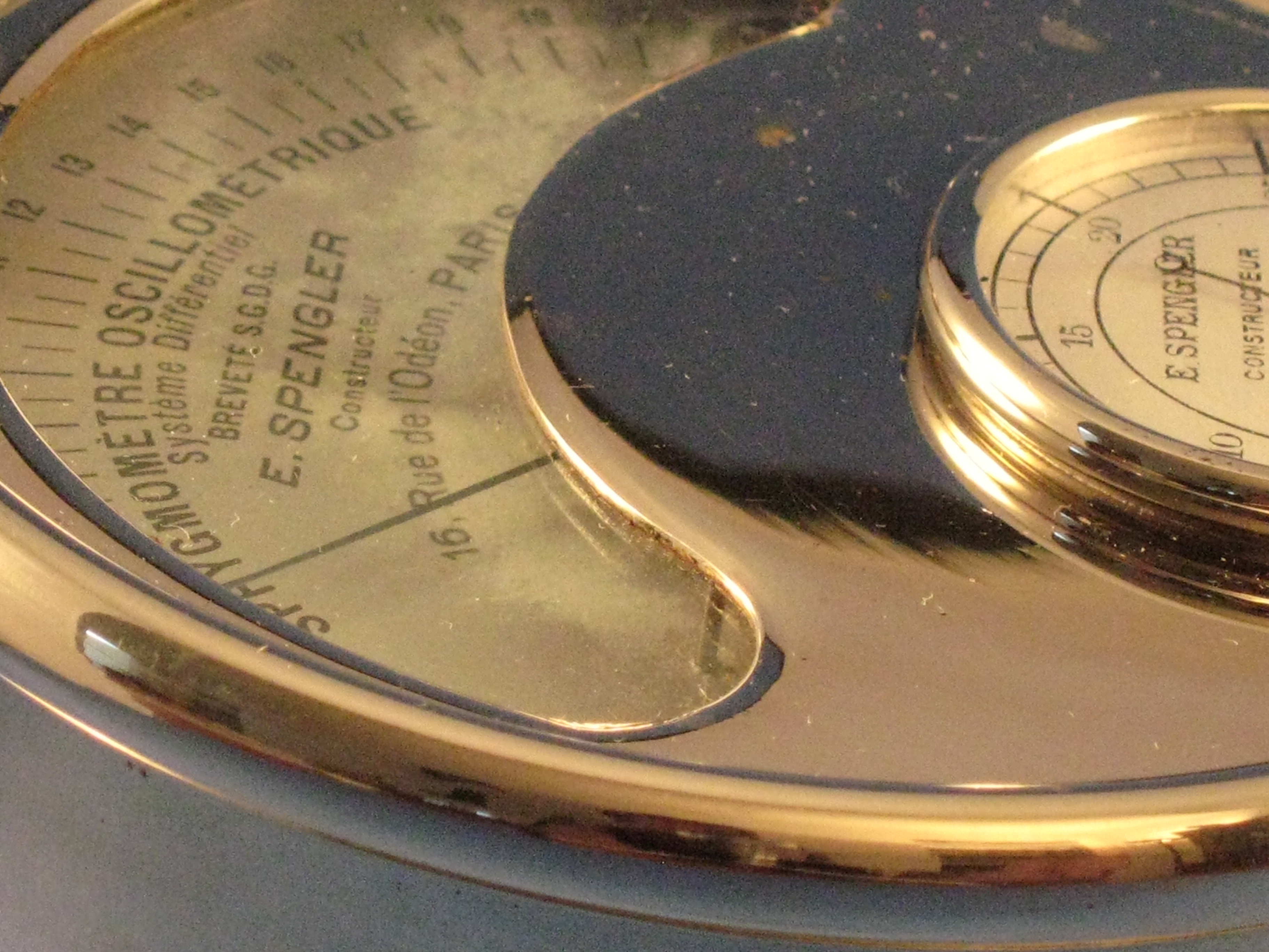 1910, Emile Spengler fabrique l'innovation de Victor Pachon